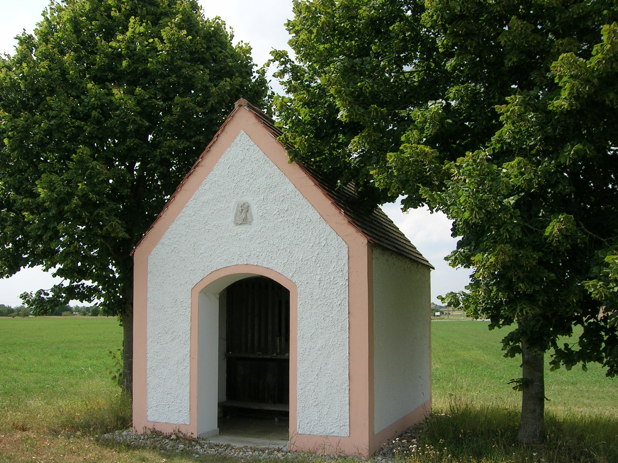 Feldkapelle, 19. Jh., südlich von Ziegelhof; mit Ausstattung.